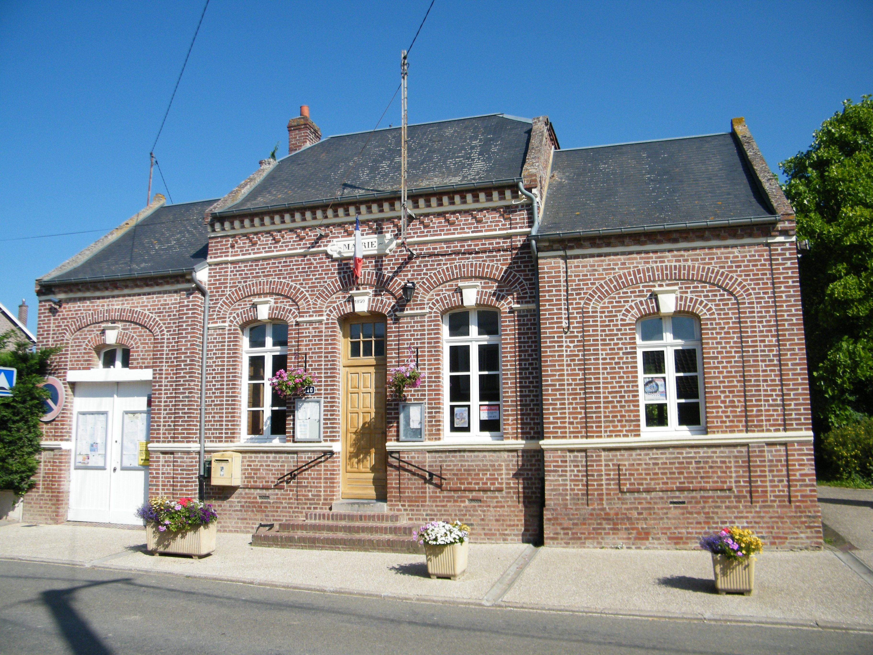 Mairie.